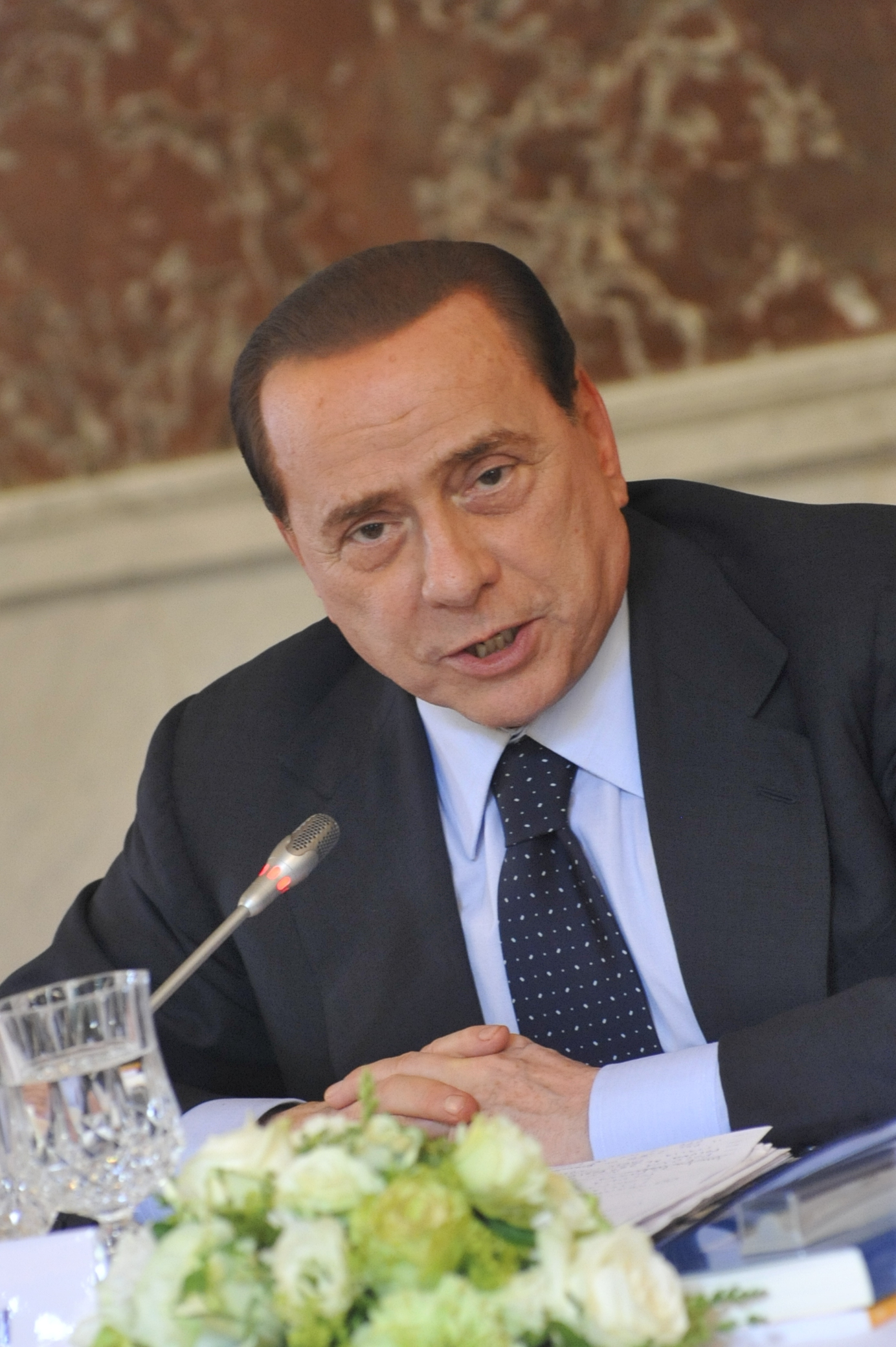 EPP Summit 18 June 2009